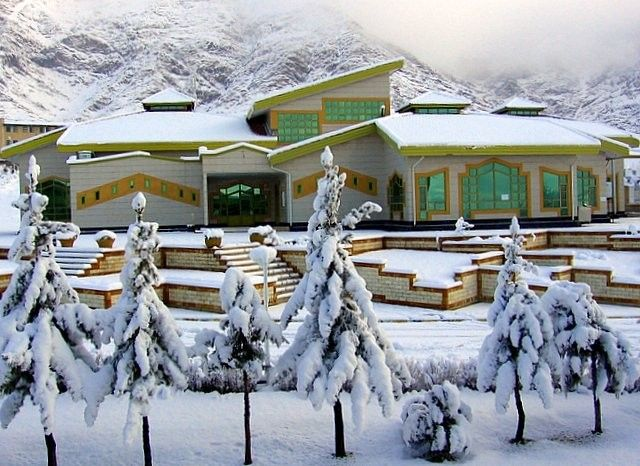 سلف غذا خوری دانشگاه ازاد ملایر